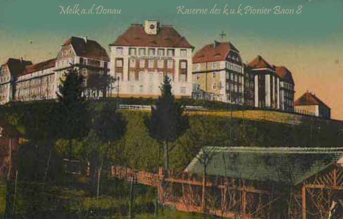 Pionierkaserne in Melk